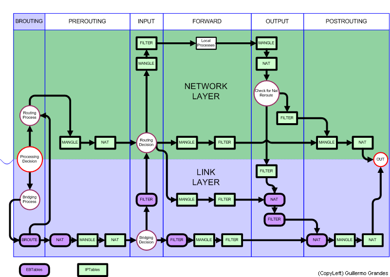 Diagrama Netfilter Linux